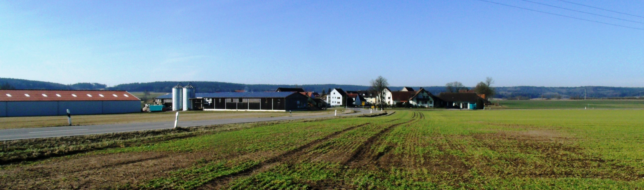 Brünst, Ortsteil der Stadt Herrieden im mittelfränkischen Landkreis Ansbach